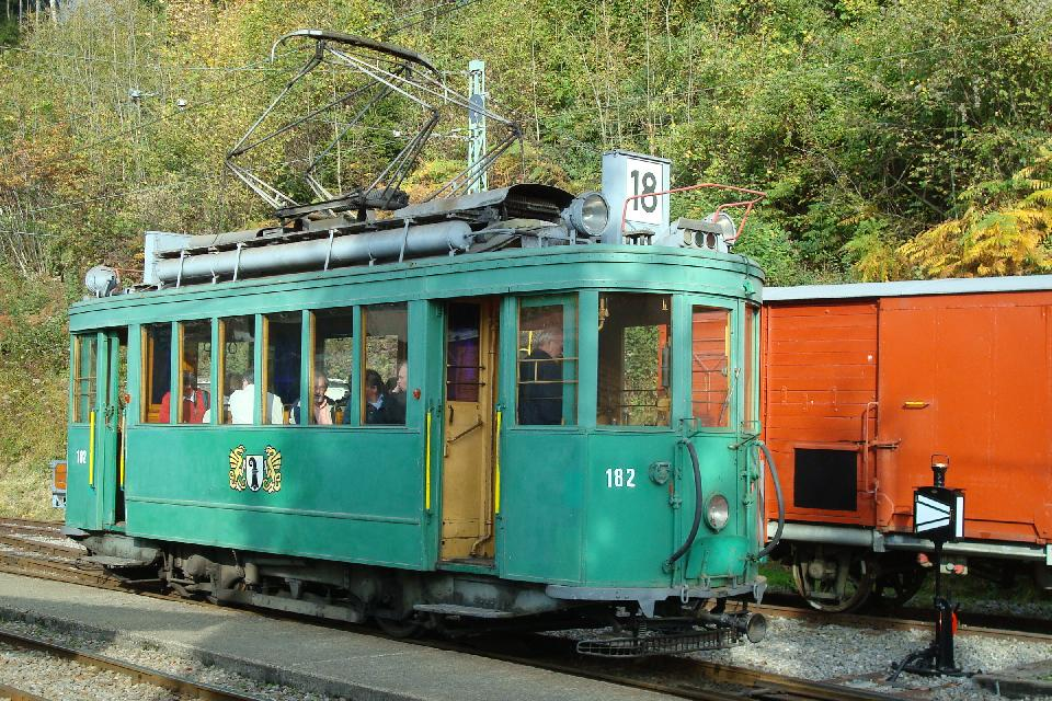 Historischer Strassenbahn Motorwagen Ce 2/2 182 der Basler Verkehrs-Betriebe (BVB) auf dem Museums-Areal der Museumsbahn Blonay–Chamby (BC) in Chamby-Musée (Chaulin) im Herbst 2008.